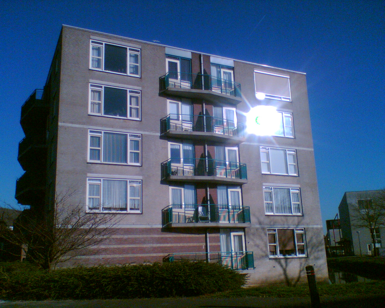 Netherlands, Woerden, Weidebloemenlaan, building